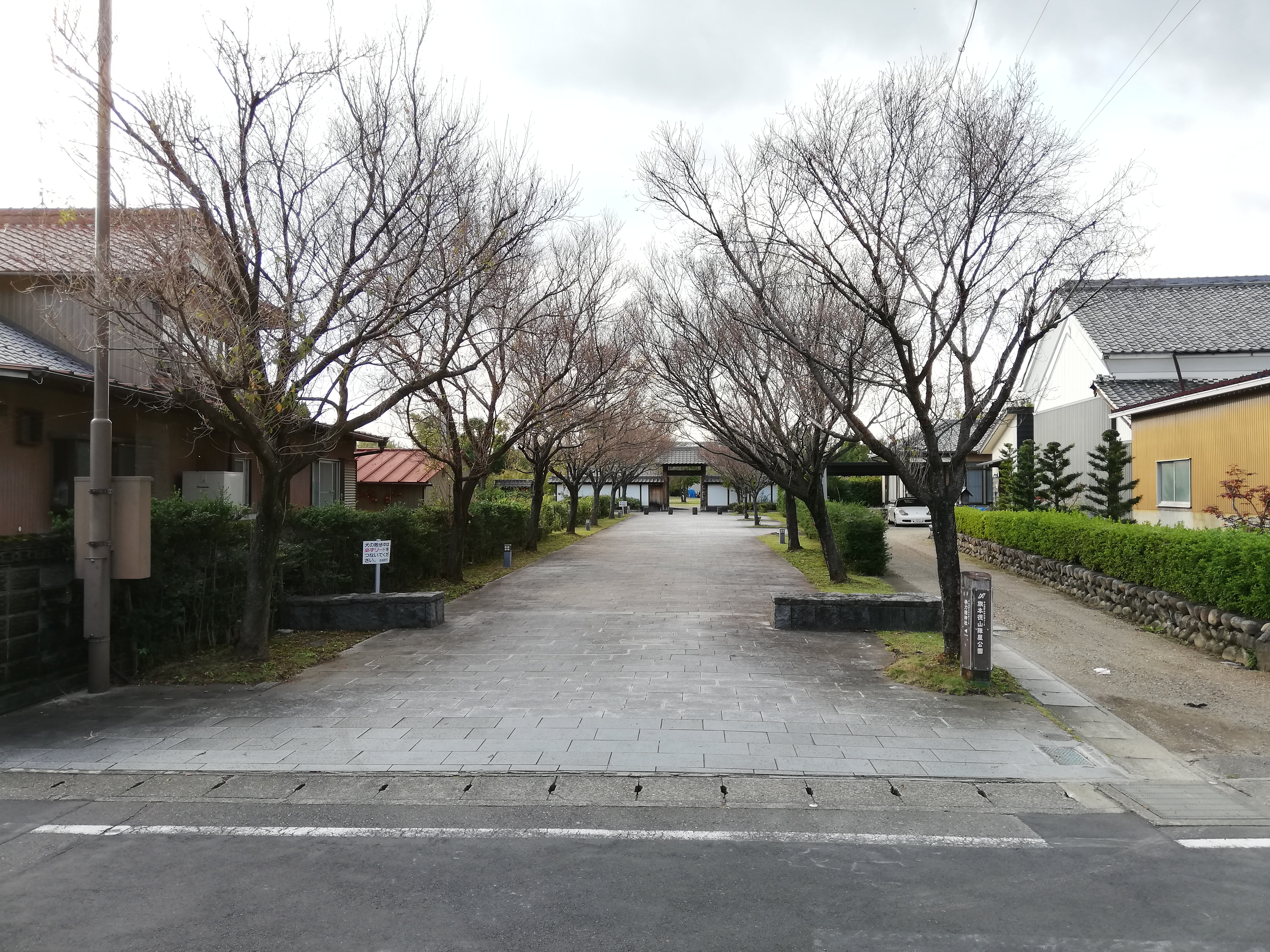 旗本徳山陣屋公園の正面。